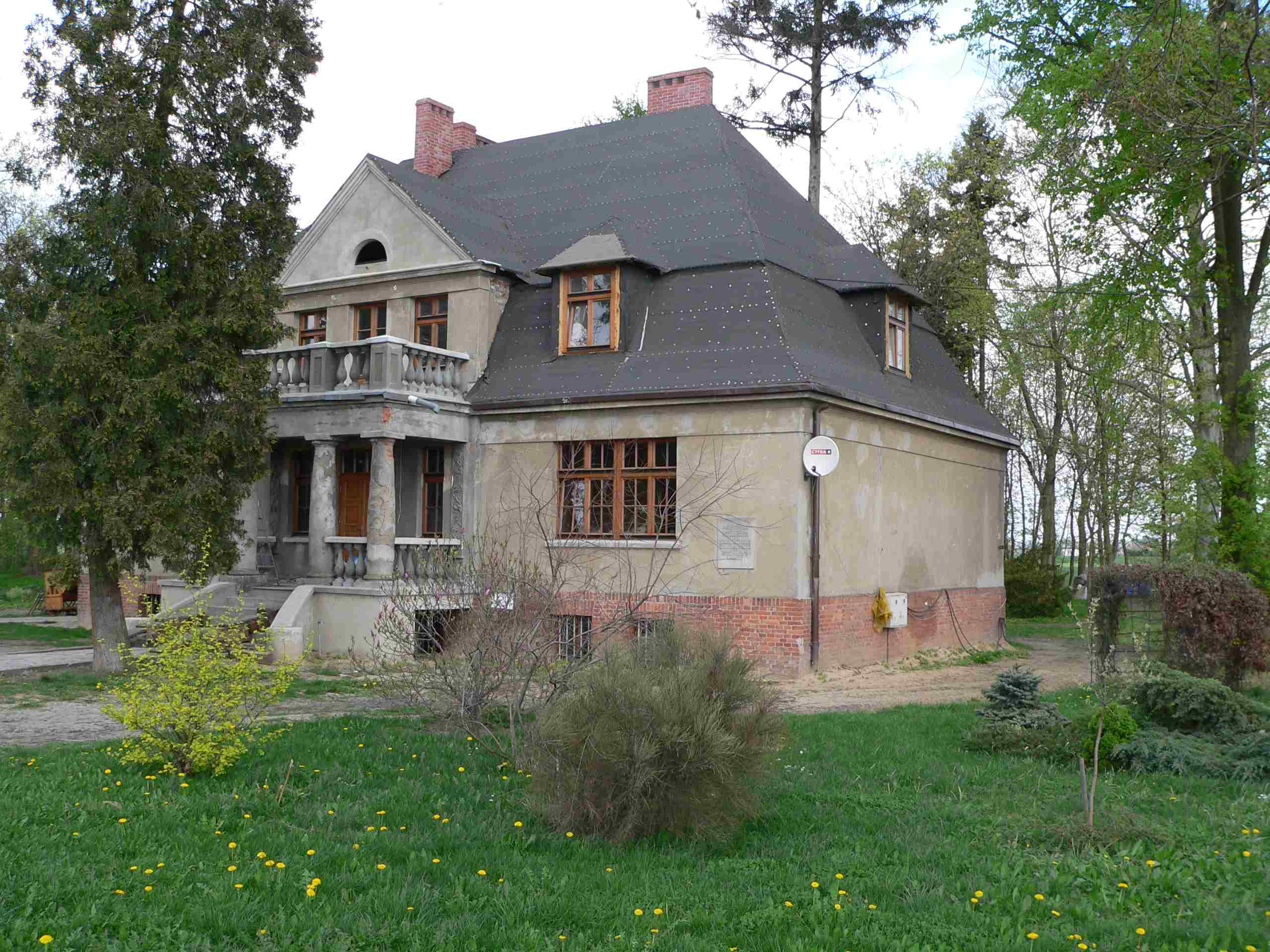 Gościeradz - zespół dworski, XIX-XX w.: dwór, 1931-1934; park, 2 poł. XIX w. (zabytek nr A/462/1-2)